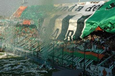 hinchada banfield